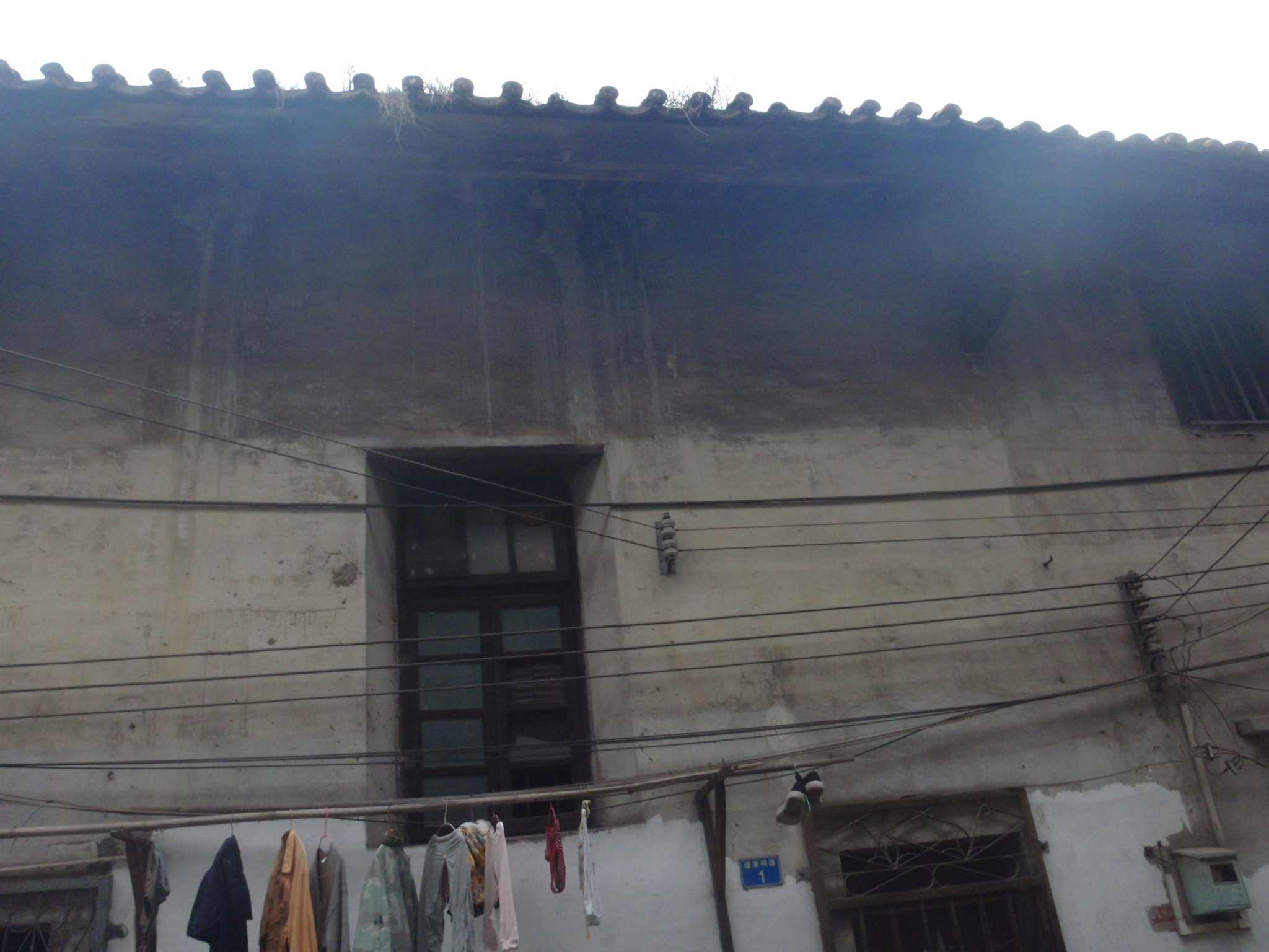 粵語: 廣州 潘能敬堂